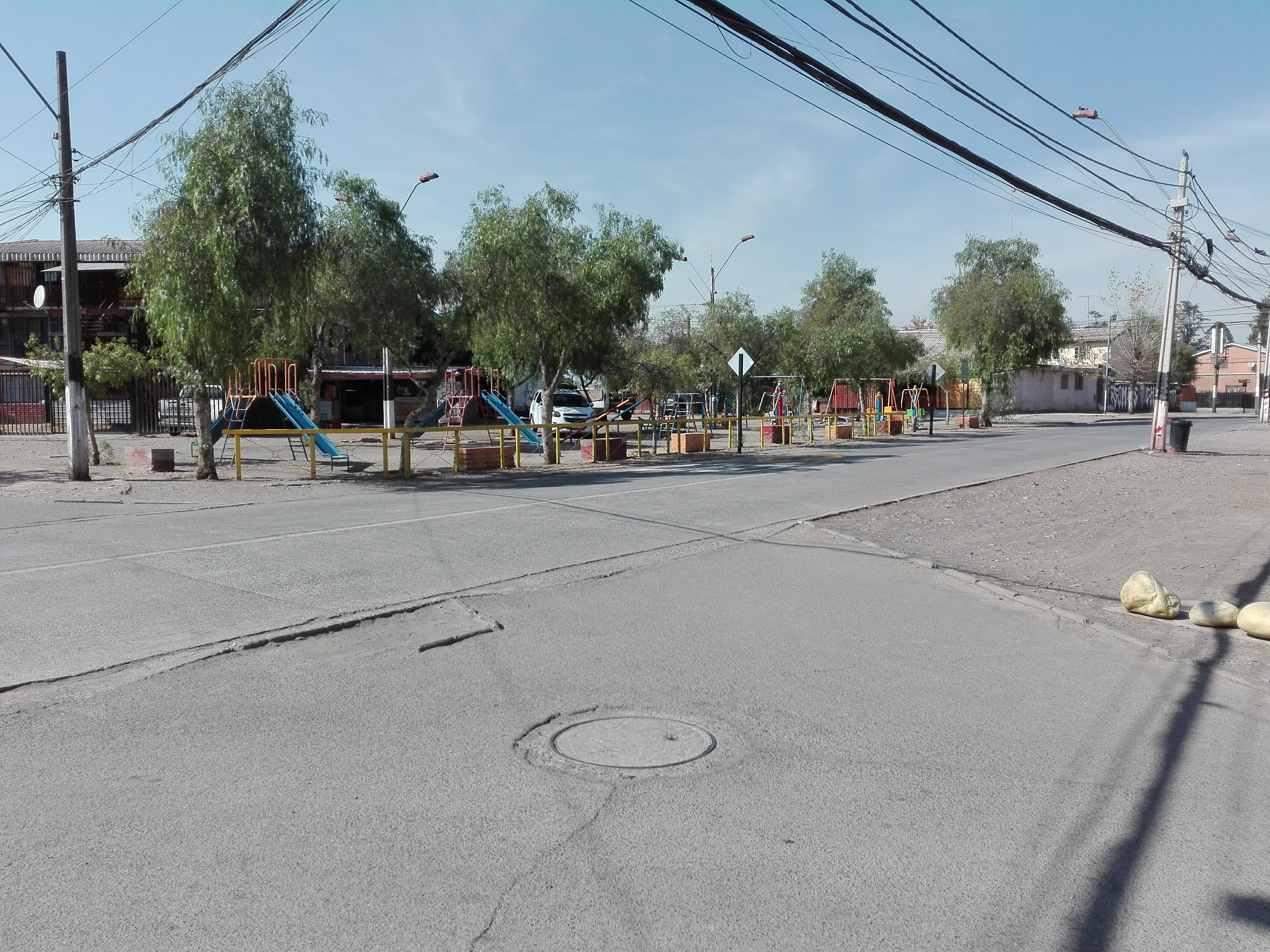 Plaza de la villa Los Maitenes de Pedro Aguirre Cerda, Santiago de Chile